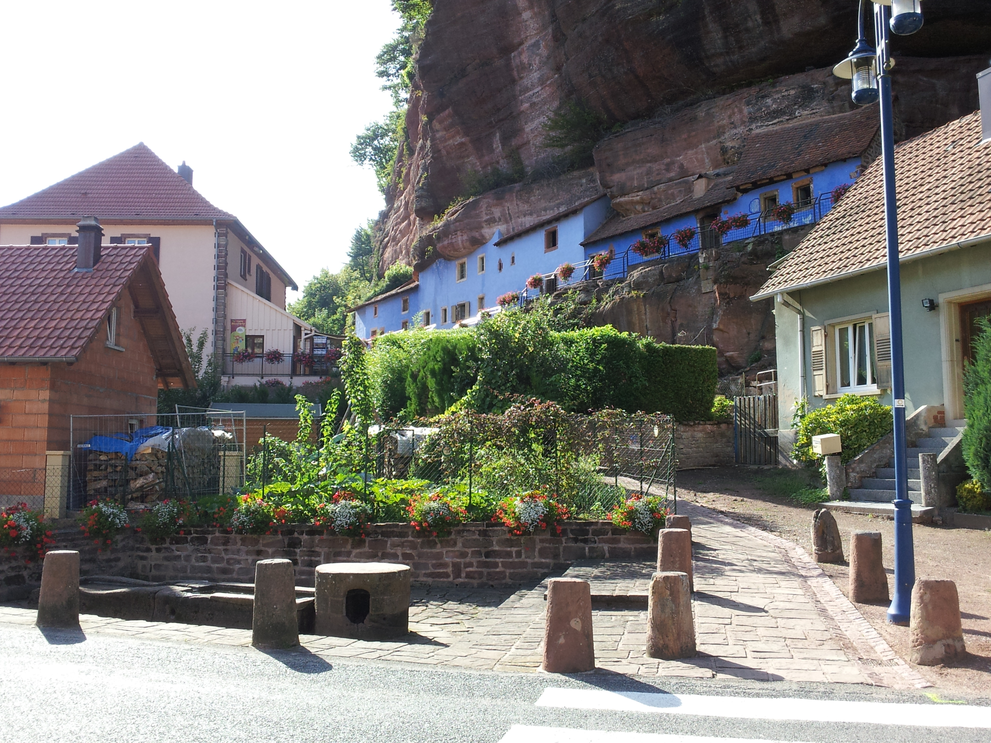 Le village de Graufthal (Bas-Rhin, France) et ses maisons troglodytes